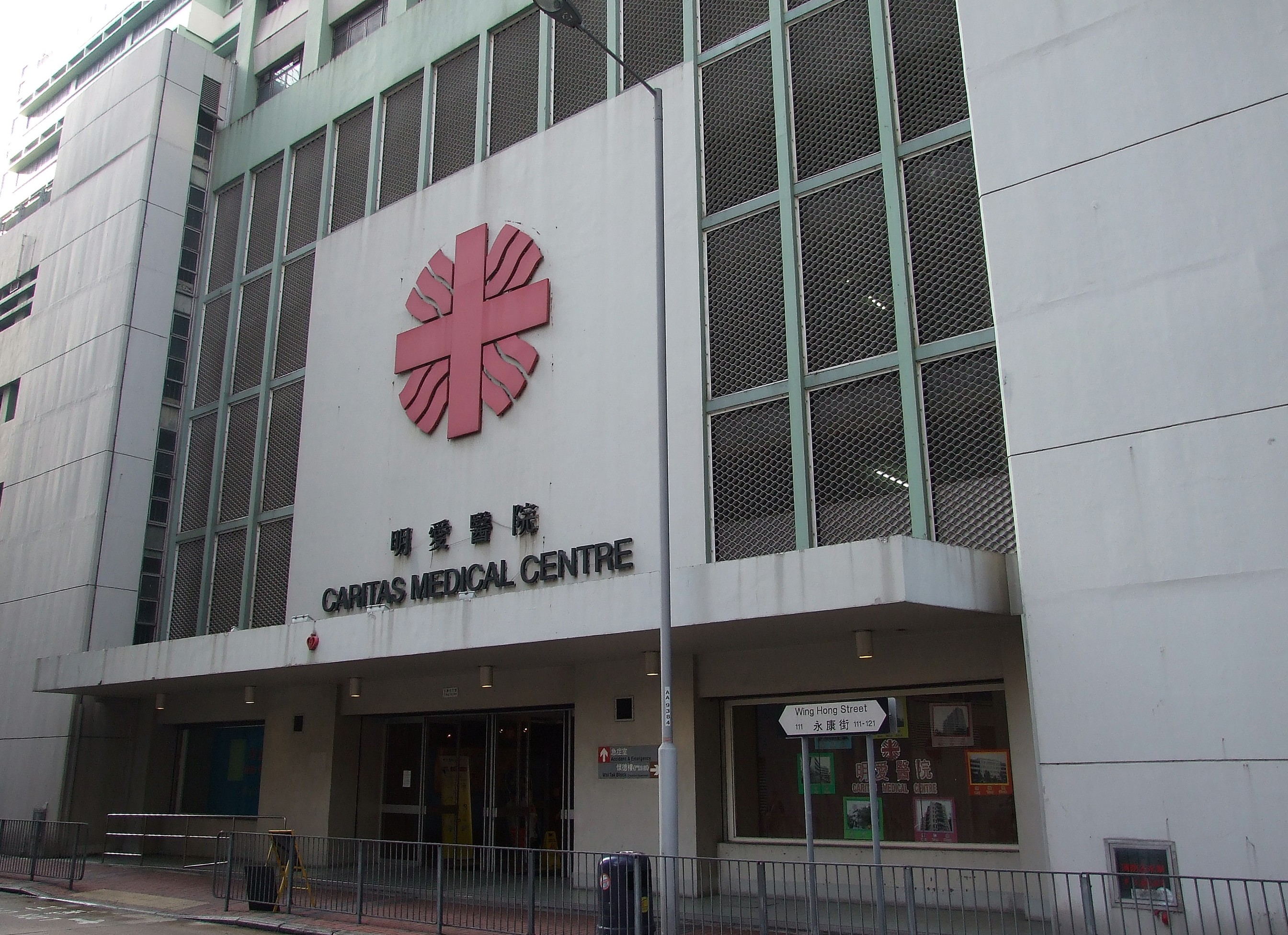 中文（香港）: 明愛醫院